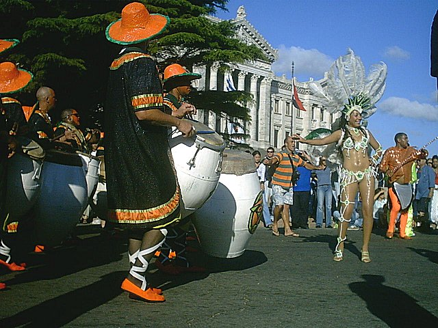 Descripción: Circunvalación del Palacio Legislativo de Montevideo, Uruguay. Primera celebración del Día Nacional del Candombe. Fuente: trabajo propio. Fecha: 03/12/2006 Autor: NeMo Permiso: Dominio Público